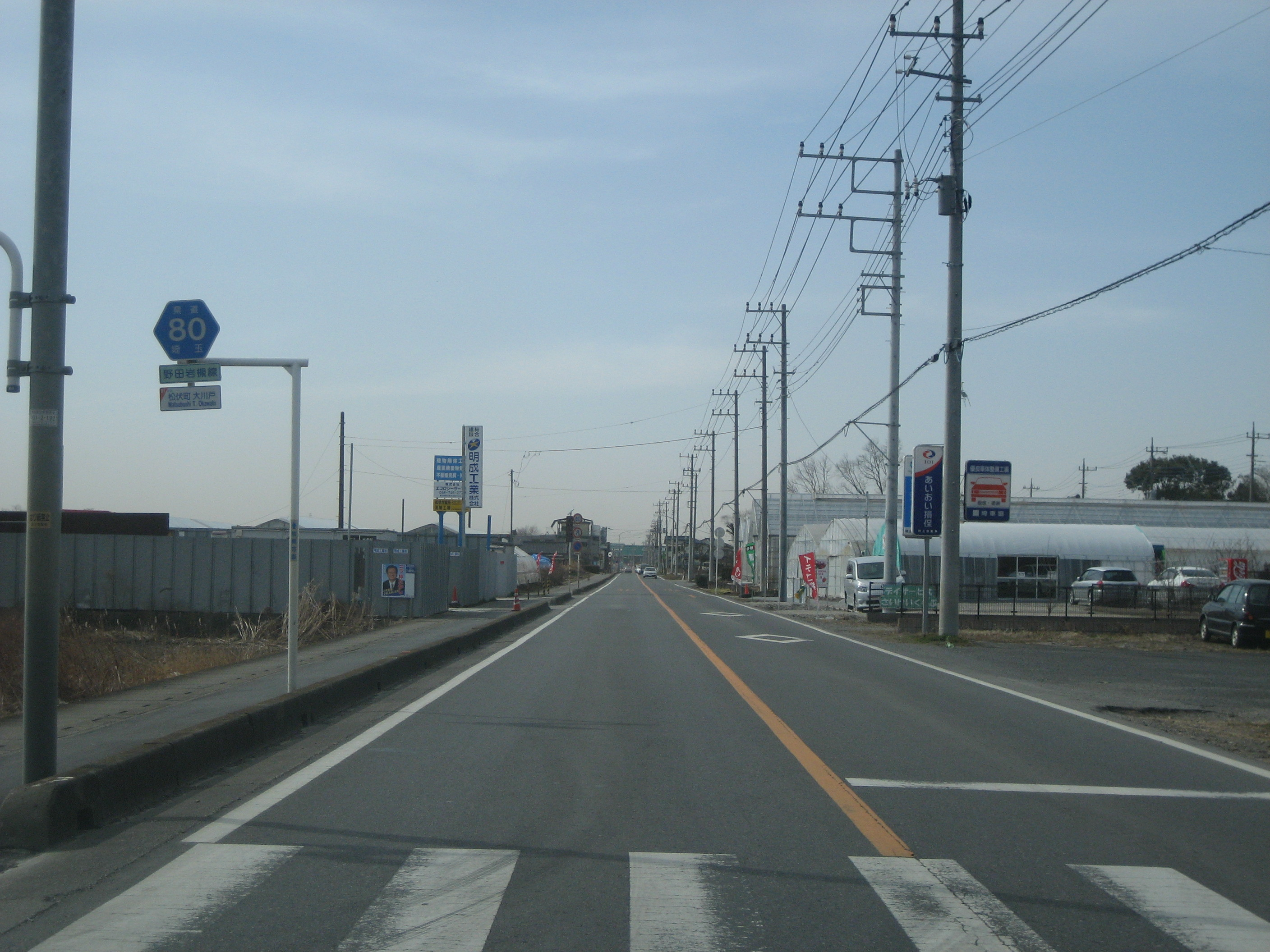 埼玉県道80号野田岩槻線（埼玉県松伏町）